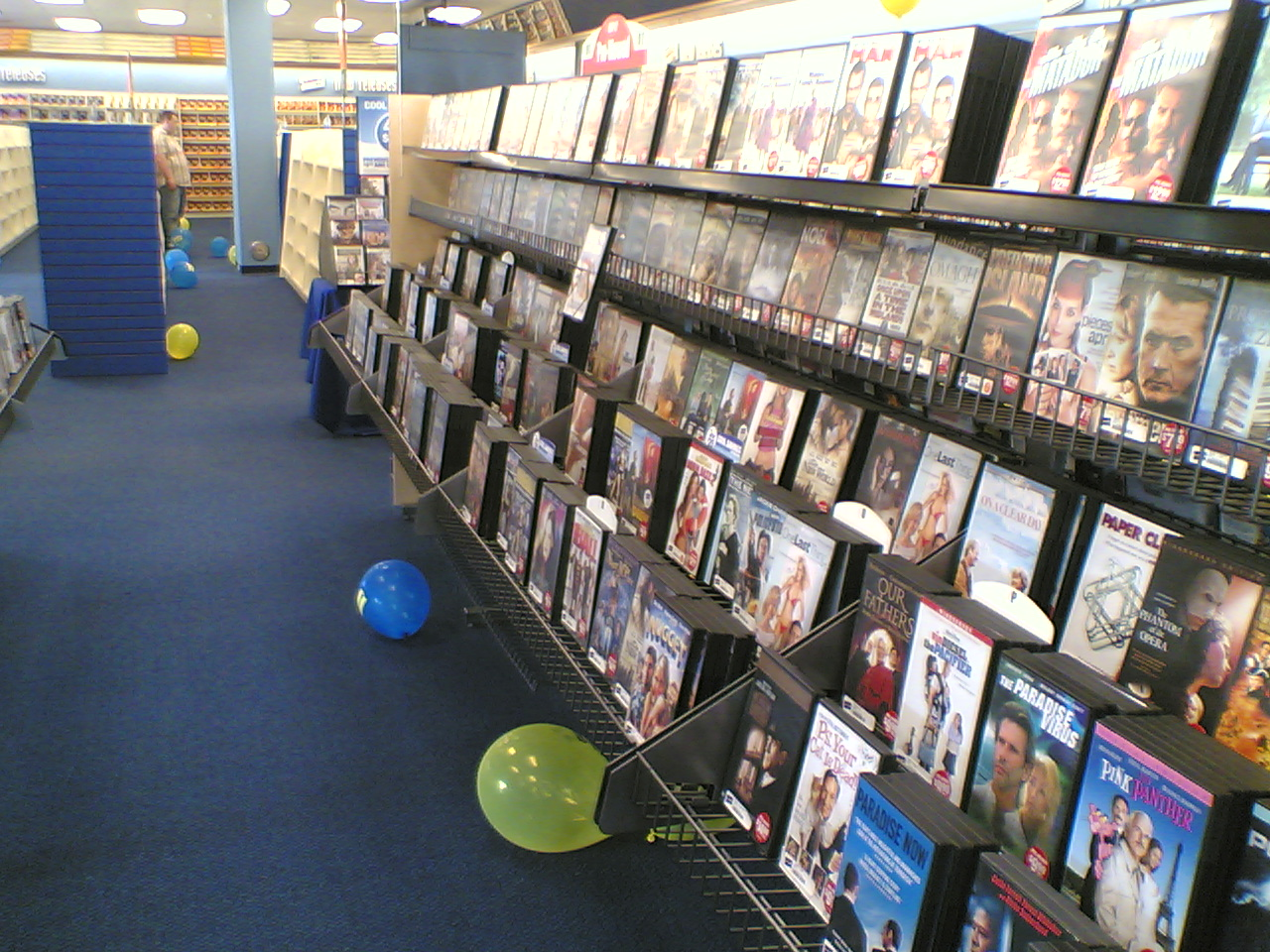 A video store in Iowa